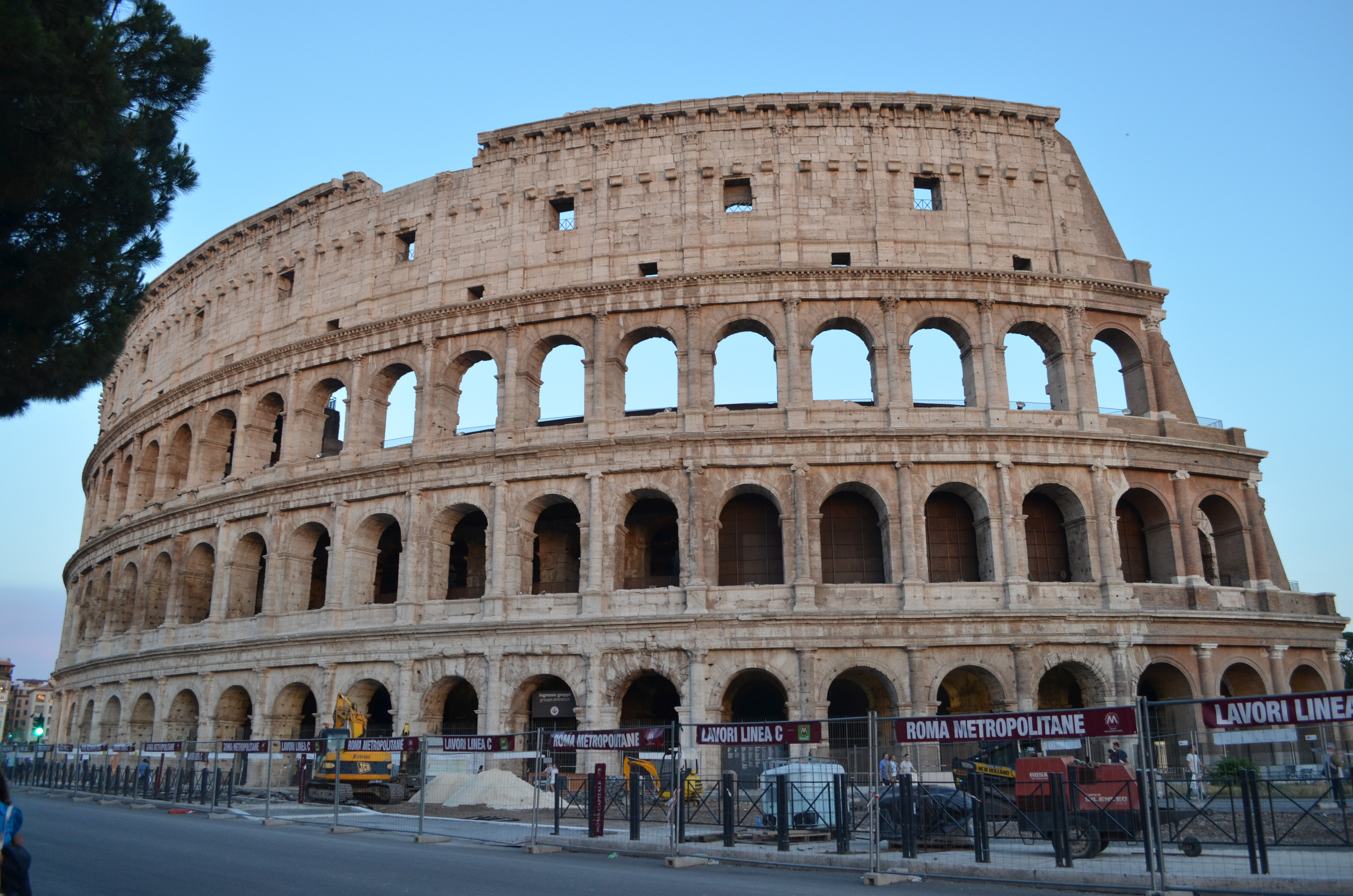 Colosseum